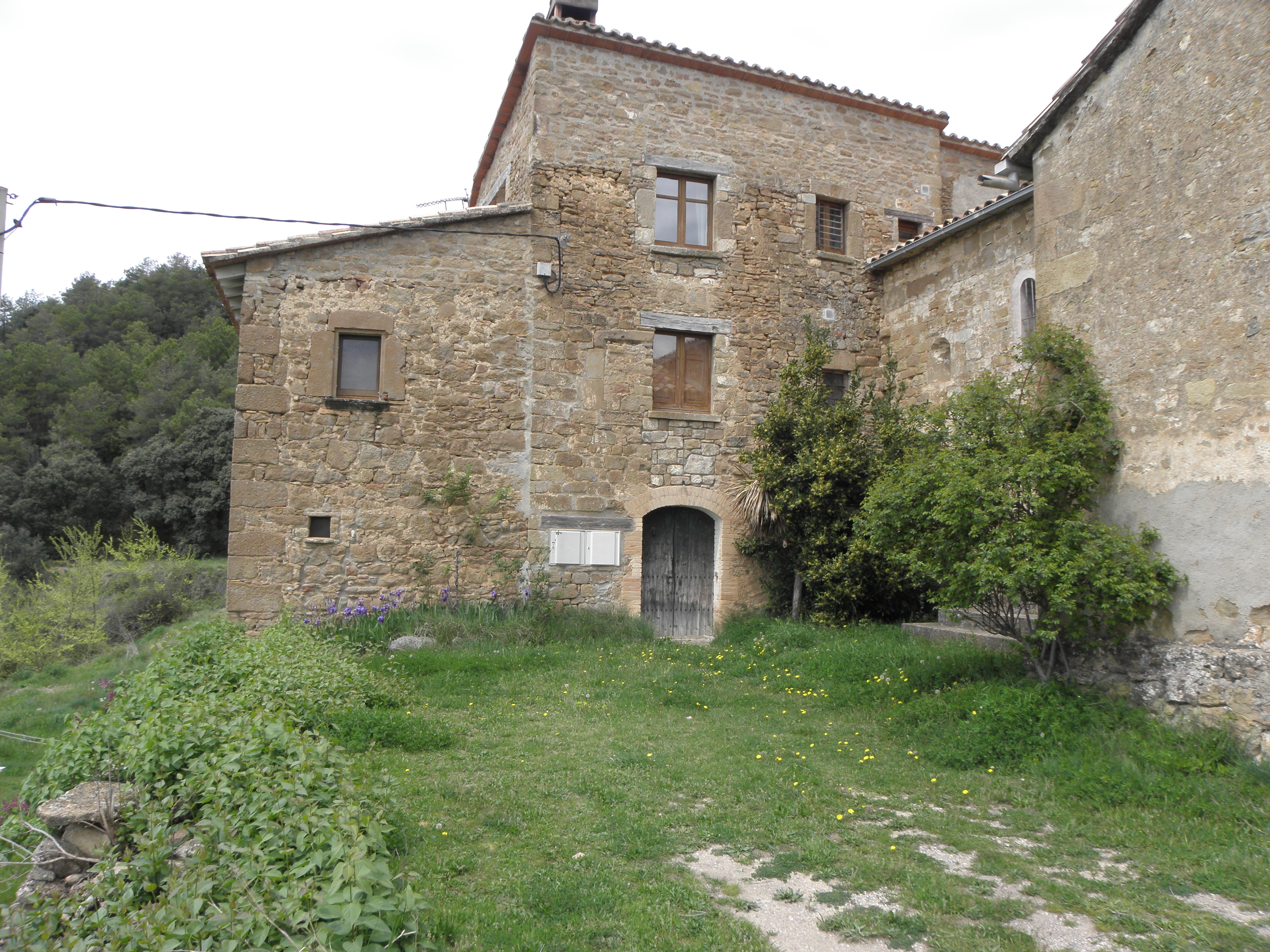 Rectoria de Timoneda (Lladurs, Solsonès)